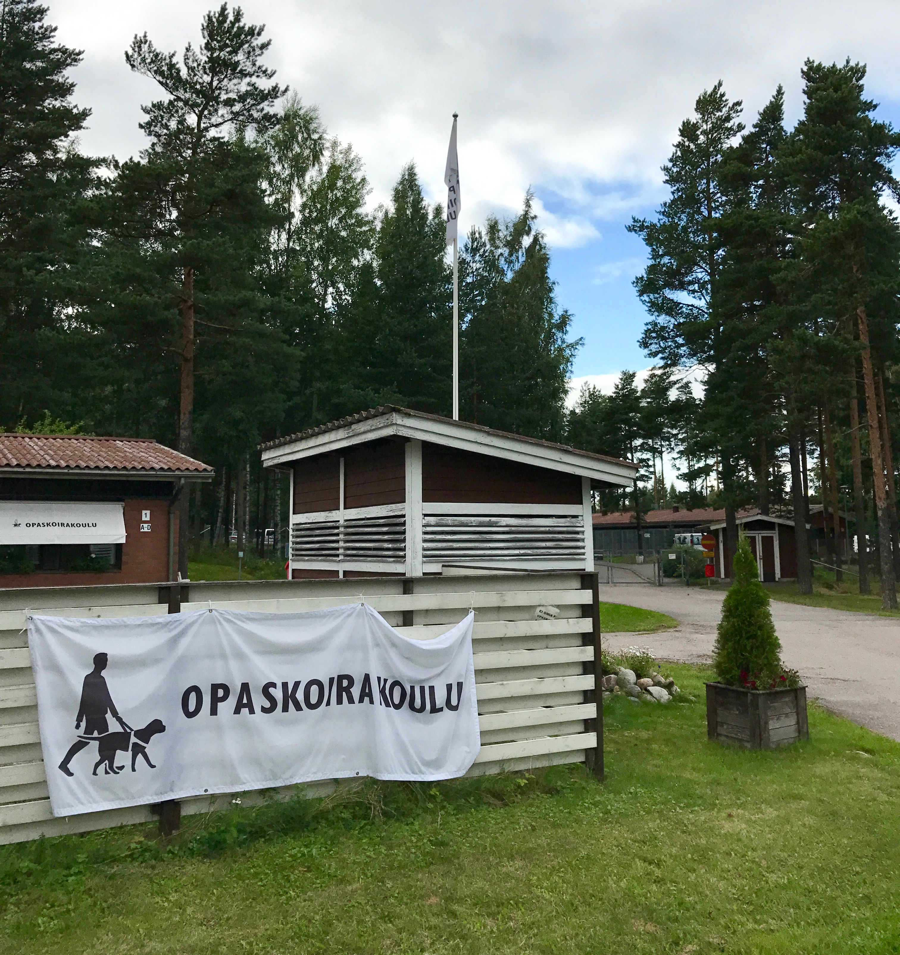 Opaskoirakoulu Vantaan Itä-Hakkilassa.